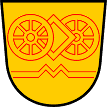 Nekdanji grb občine Logatec.